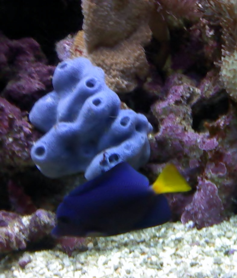 Haliclona caerulea en acuario de arrecife